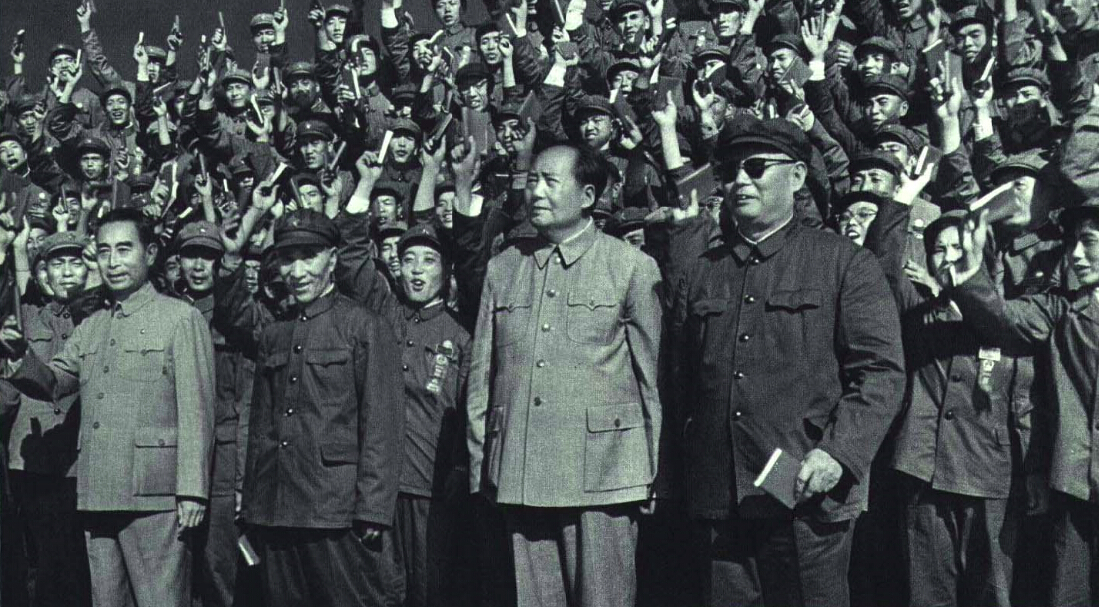 1966-11 1966年国庆典礼毛泽东叶剑英